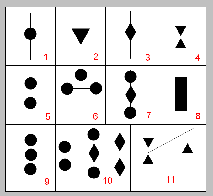 Marcas diurnas para embarcaciones según el Reglamento Internacional para Prevenir Abordajes